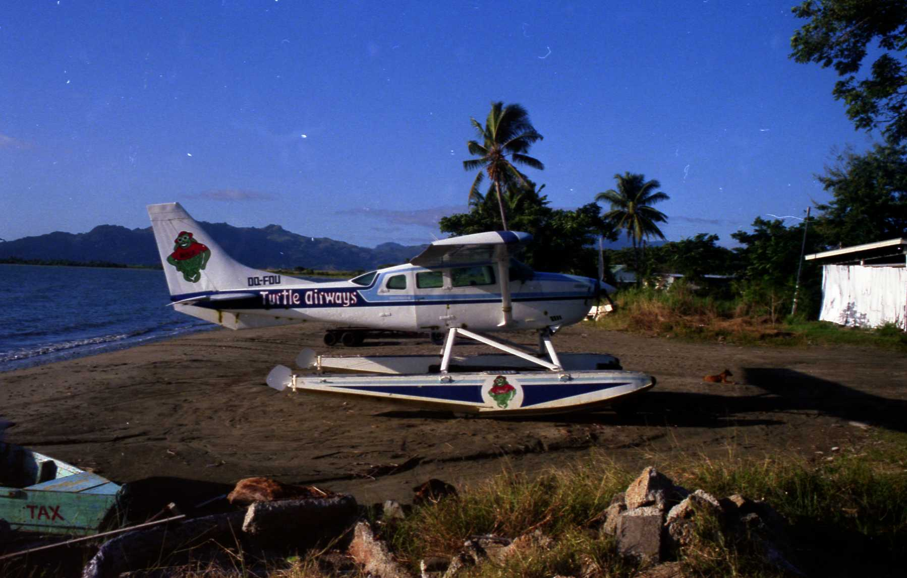 Fiji 1986